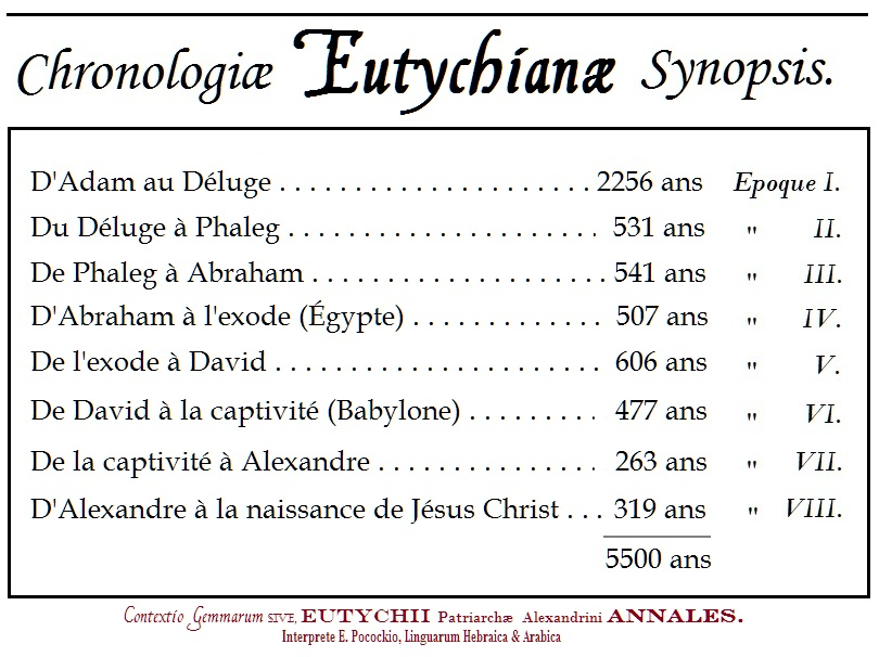 5500 ans entre Adam et Jésus, cf. Contextio Gemmarum Sive, Eutychii Patriarchae Alexandrini Annales, par E. Pocockio